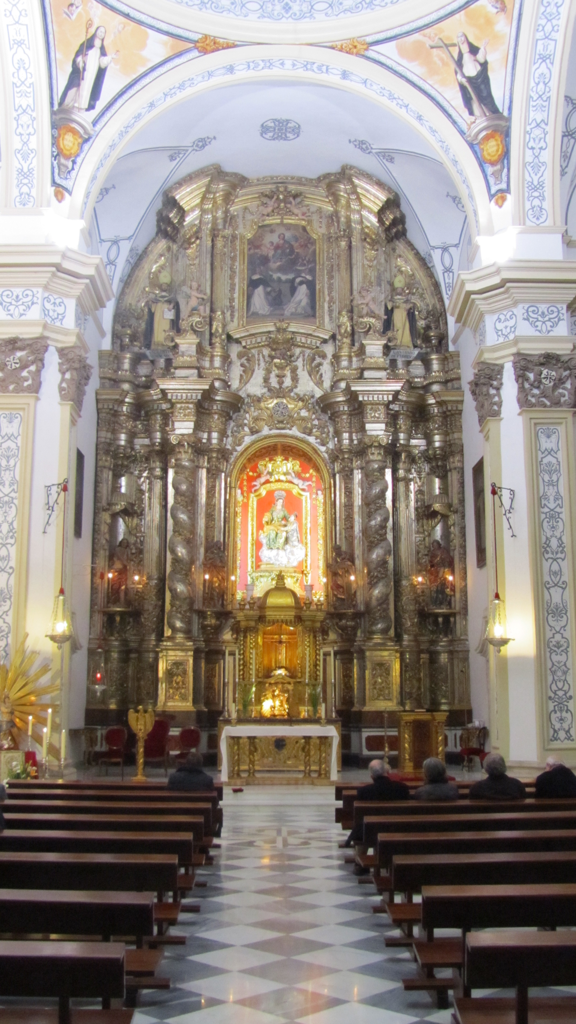 Interior de la Iglesia conventual de Santa Ana (siglo XVIII). Murcia. Región de Murcia. España.